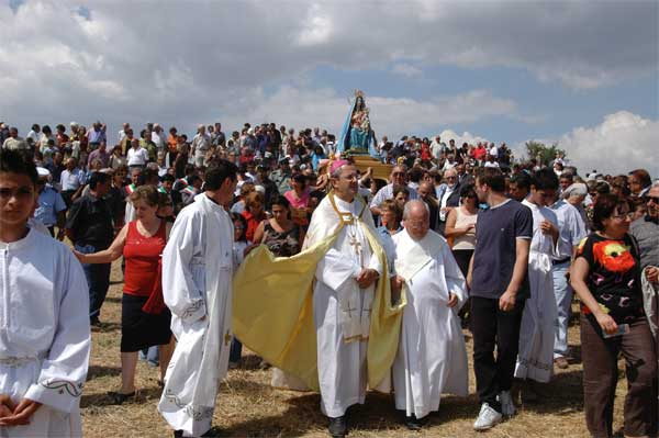 Un momento della processione in onore della Madonna di Anglona, guidata dal vescovo mons. Francescantonio NolÃ¨